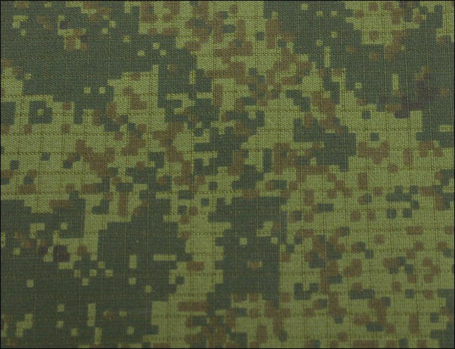 Цифровая флора